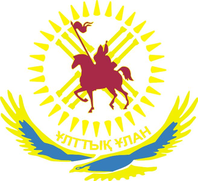 Символ Национальной Гвардии Республики Казахстан